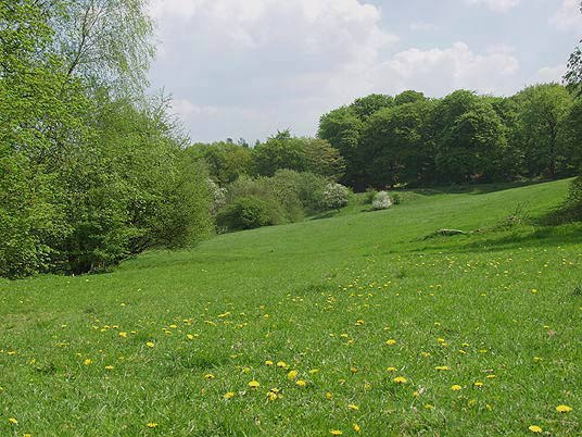 Blick auf die "Delle" im Naherholungsgebiet Scharpenacken, Wuppertal